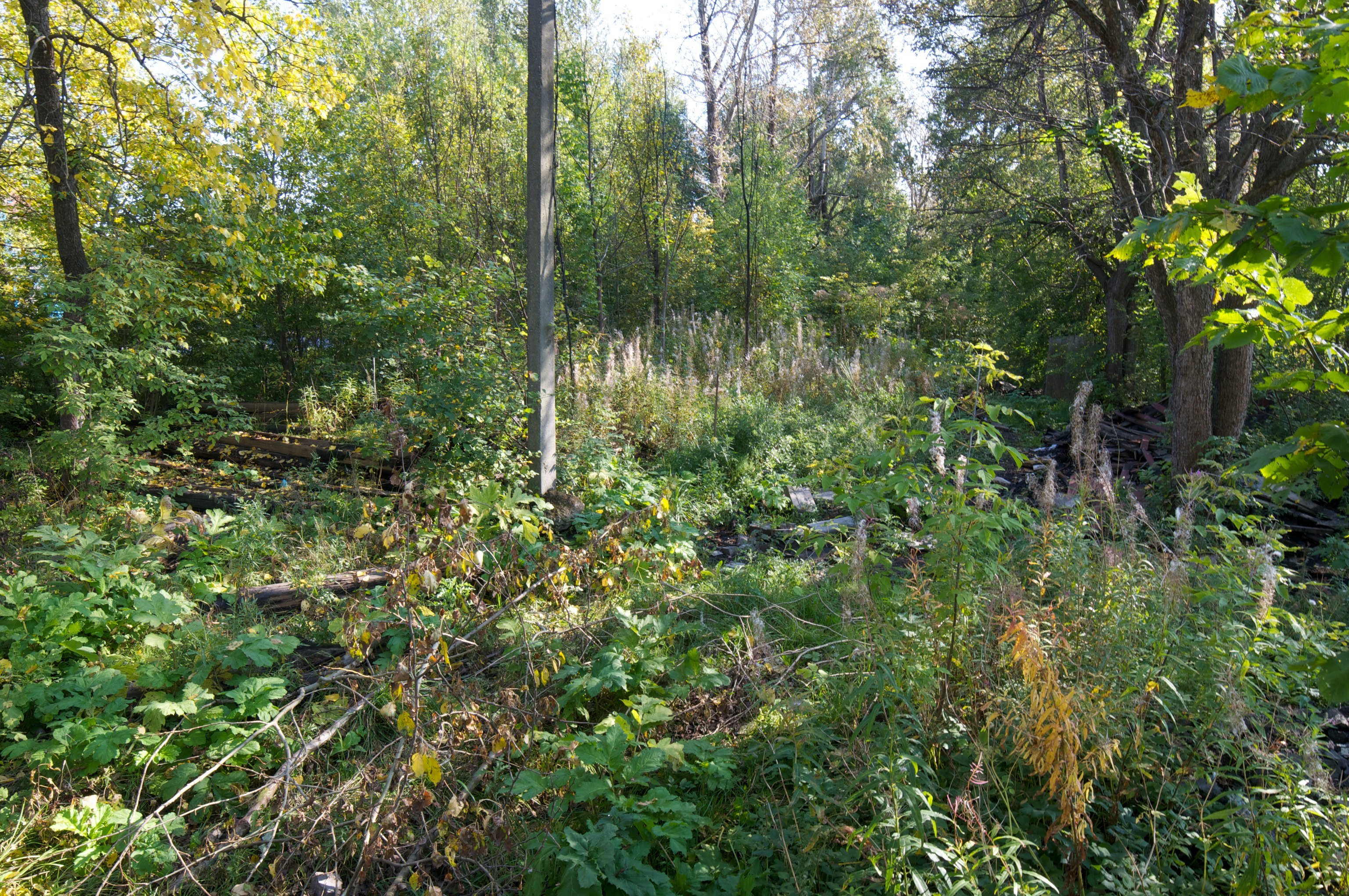 Разрушенный дом, в котором в 1921-1926 гг. жил выдающийся советский энергетик Б.Е.Веденеев: Волхов, Ленинградская область